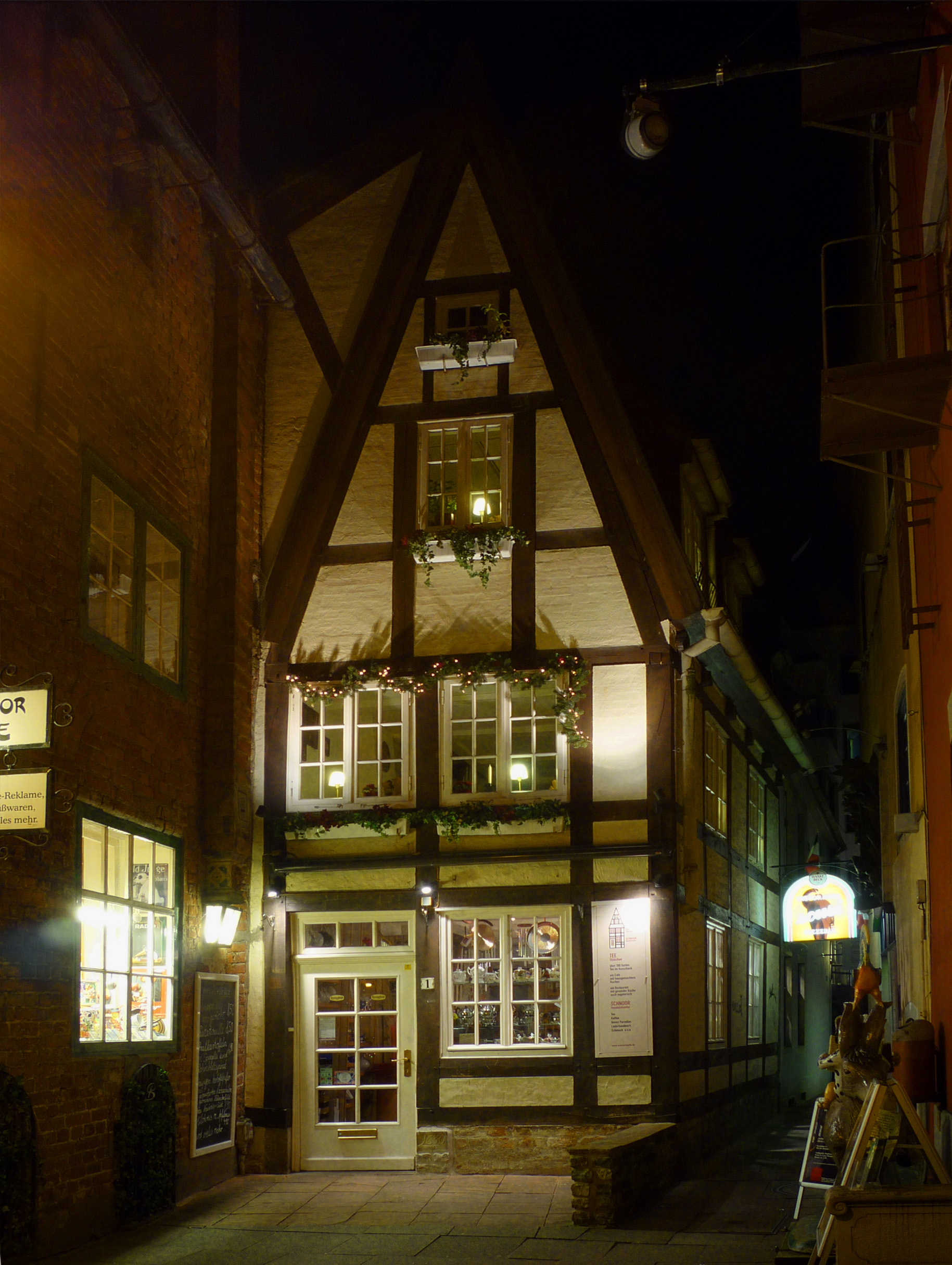 Schnoor-Viertel in Bremen, Wüstestätte 1.Das abgebildete Objekt ist ein geschütztes Kulturdenkmal in der Freien Hansestadt Bremen, mit der Nr. 1396 beim Landesamt für Denkmalpflege registriert.